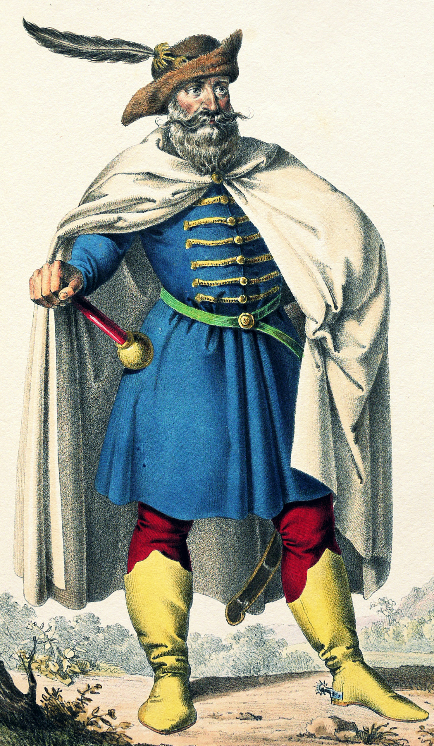 Sabolch, legendärer ungarischer Heerführer. Aus "Ungerns Erste Heerführer Herzoge und Koenige. In einer Reihe von Bildnissen von Bela bis auf Seine Majestät Franz. I. Kaiser von Österreich König von Ungern etc. etc.Lithographie von Josef Kriehuber nach Moritz von Schwind, ca. 1828